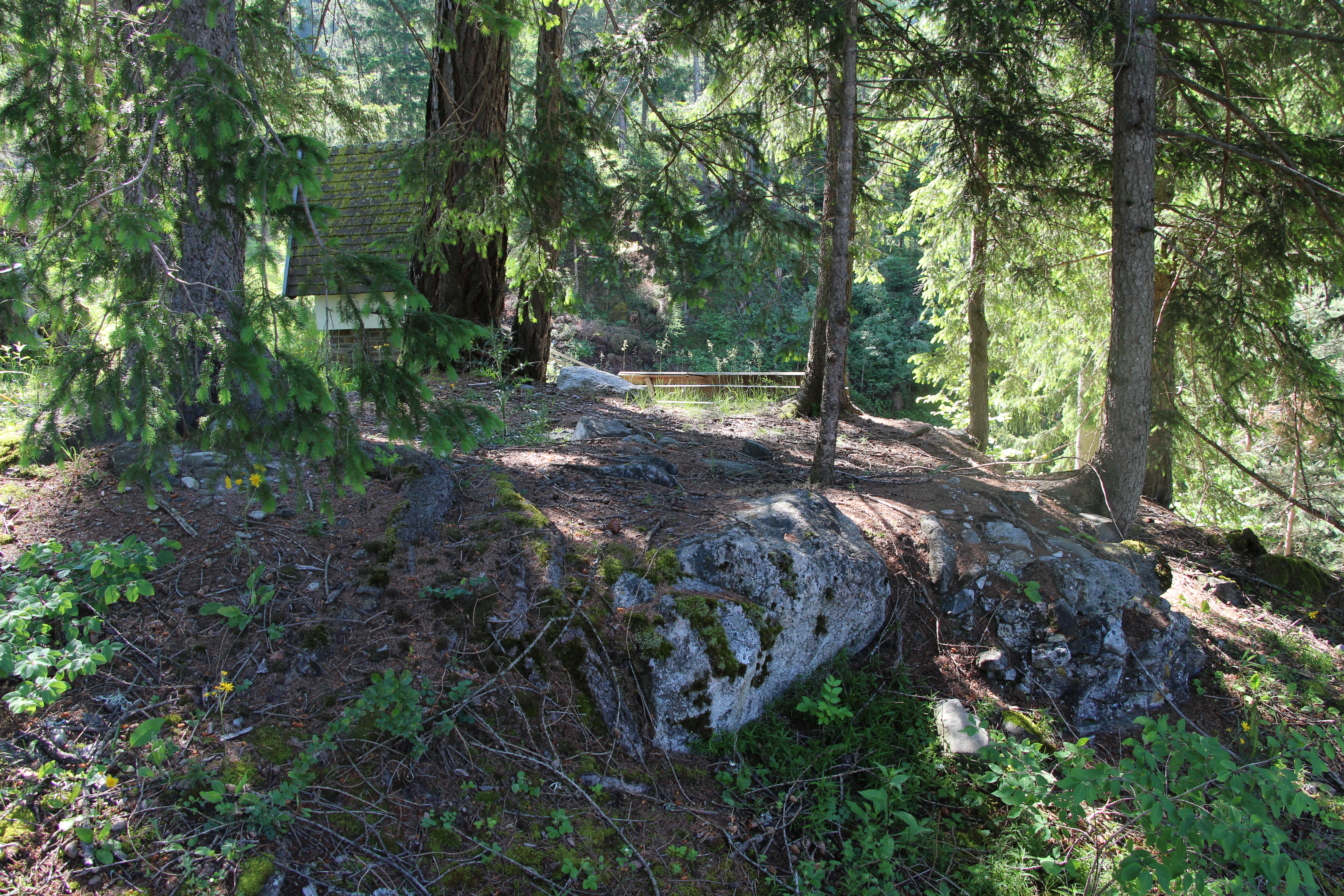 Ruinen der Gotthardkapelle auf dem Gotthardsbühel in Jerzens, im 18. Jahrhundert aufgrund des Baus der Pfarrkirche abgetragen. Zu sehen sind noch die Fundamente der Kapelle.